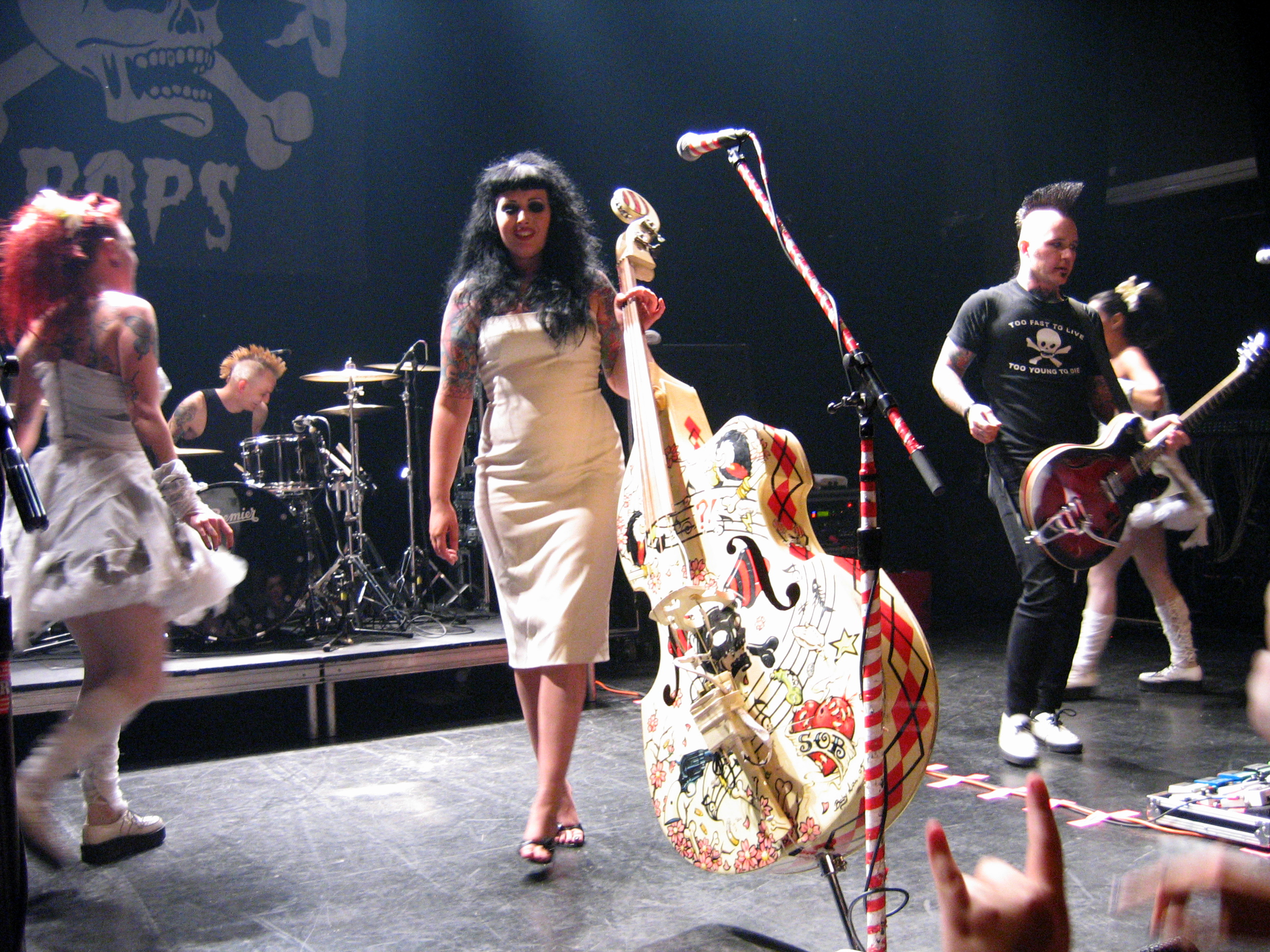 HorrorPops, taken in Montréal, Québec